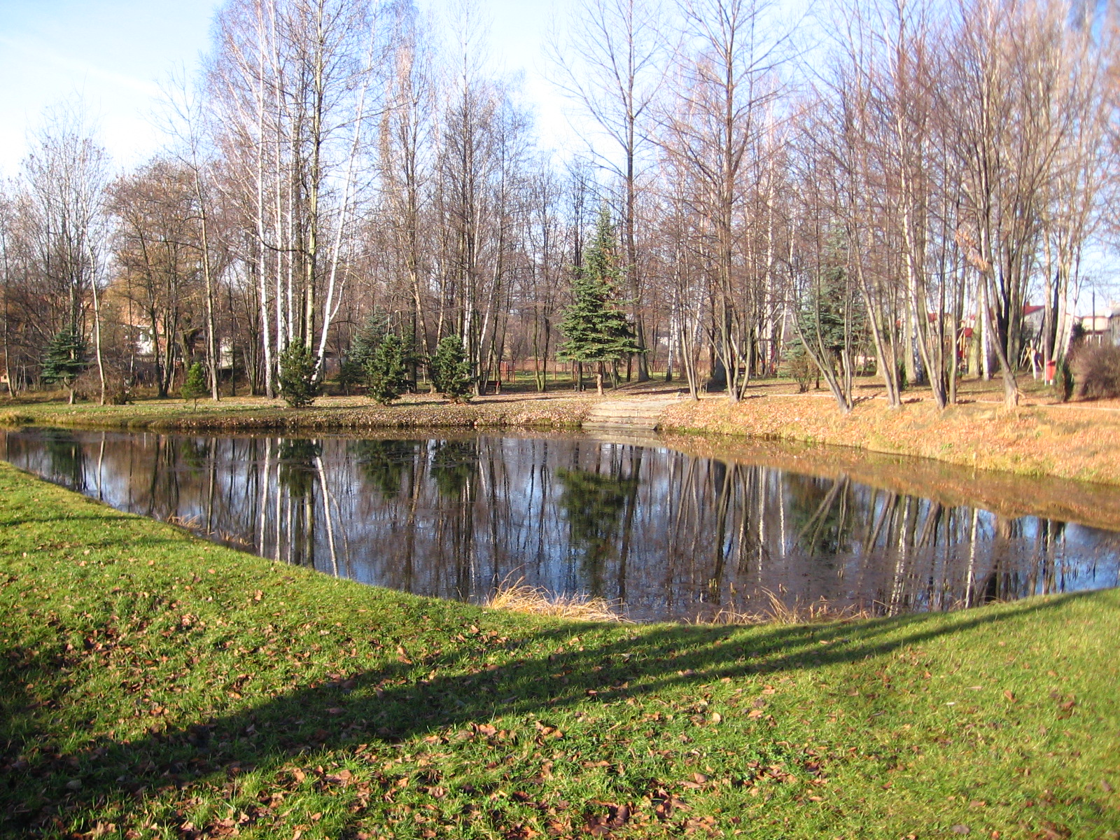 Staw w Wywierzysku w Strzemieszycach Wielkich (Dąbrowa Górnicza). foto: geograf.gp